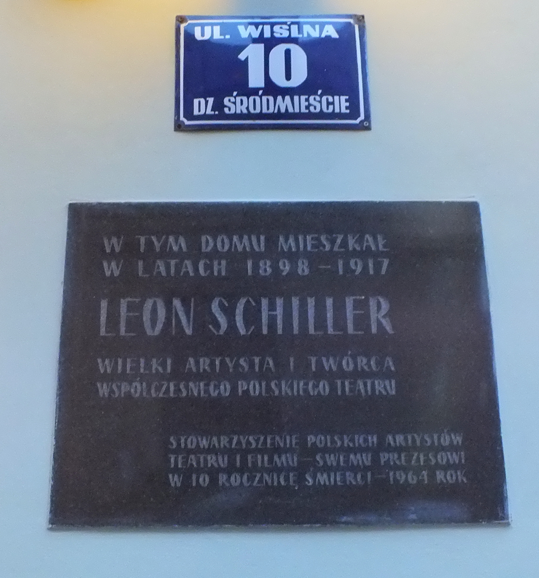 Kraków, ul. Wiślna 10